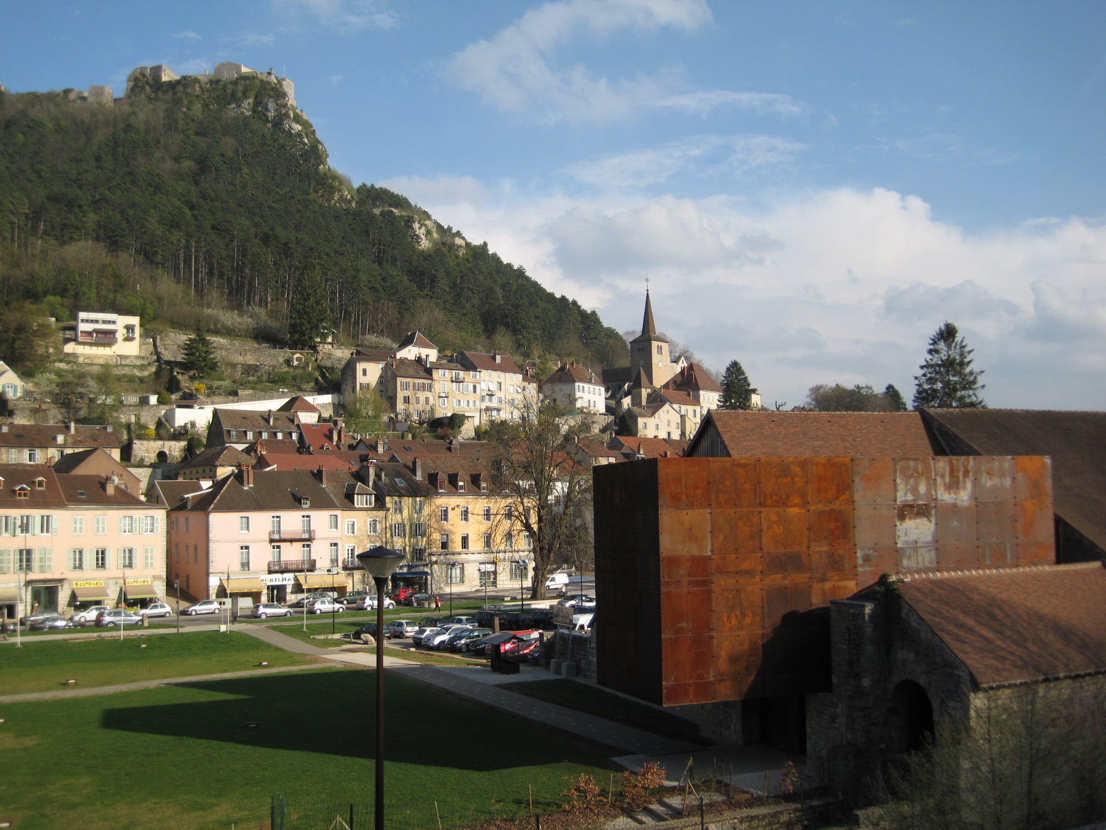 Saline de Salins-les-Bains